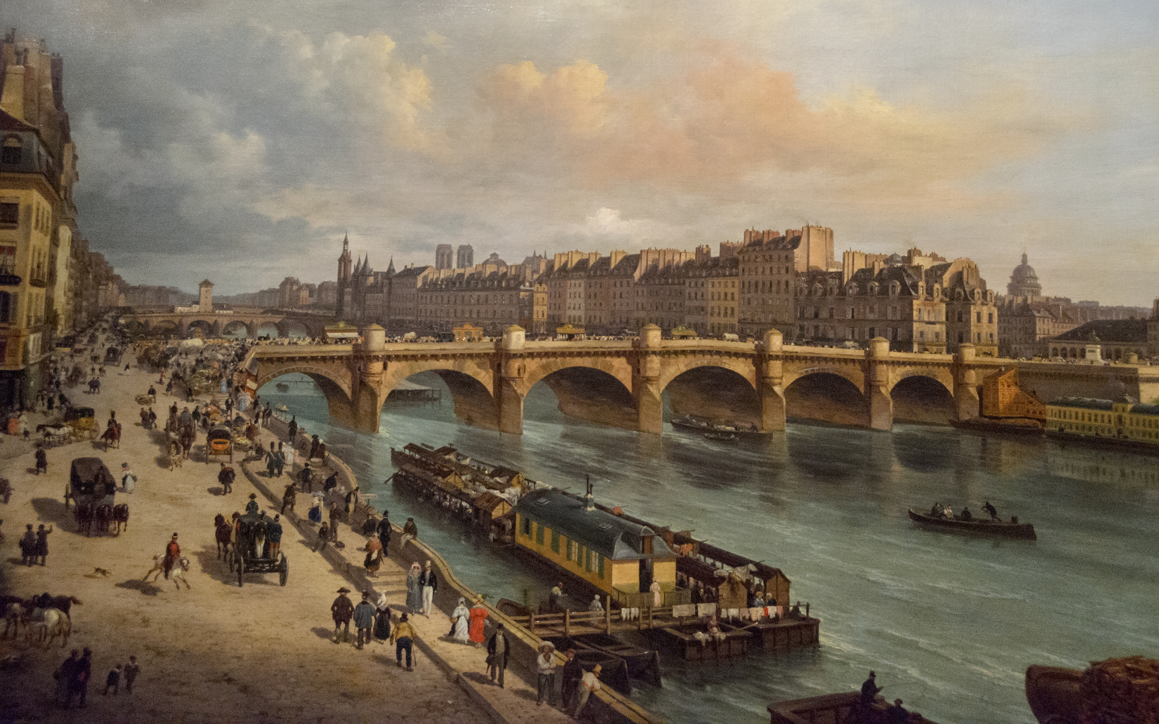 Ce tableau présente un intérêt historique et iconographique relatif au Paris de 1832. On voit encore sur le Pont-Neuf les petites boutiques en hémicycle bâties par Soufflot en 1775 ; elles disparaitront sous le Second Empire. Sur le quai de l’Horloge, avant la Conciergerie, on remarque des immeubles qui seront absorbés par les agrandissements du Palais de Justice. Les « Bains du Pont-Neuf » occupent la pointe de l’ile.